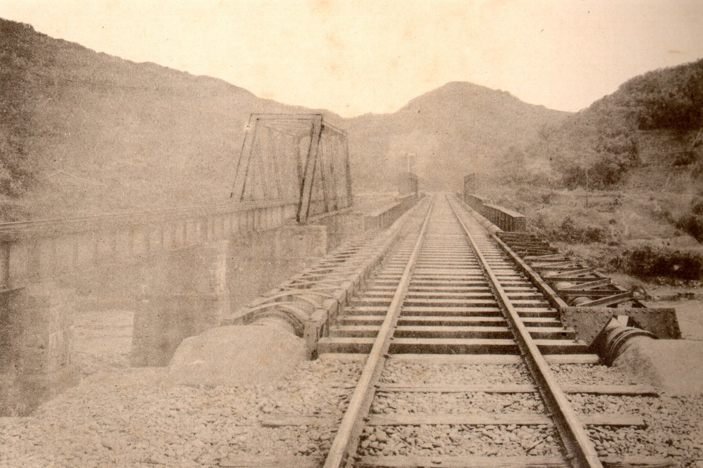 基隆水道鐵管經由縱貫鐵路基隆河橋，送水至基隆市內。